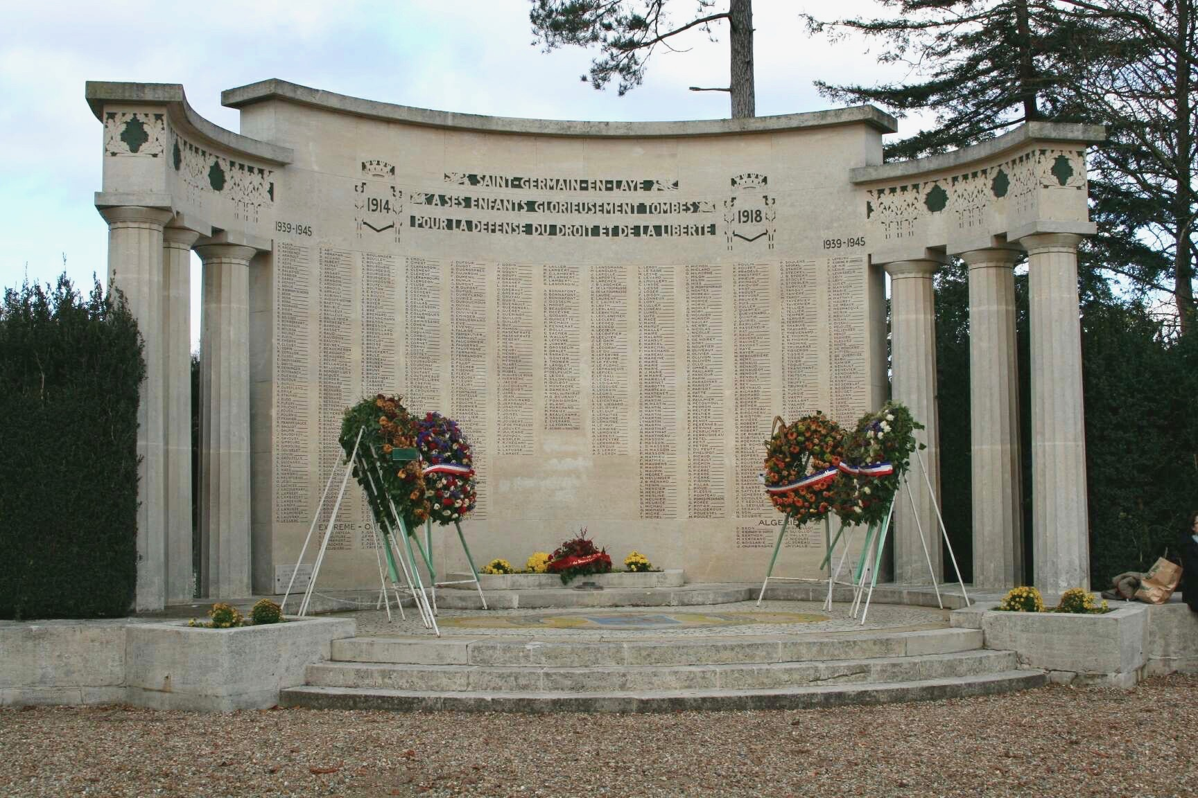 Monument aux morts de Saint-Germain-en-Laye - Yvelines (France)